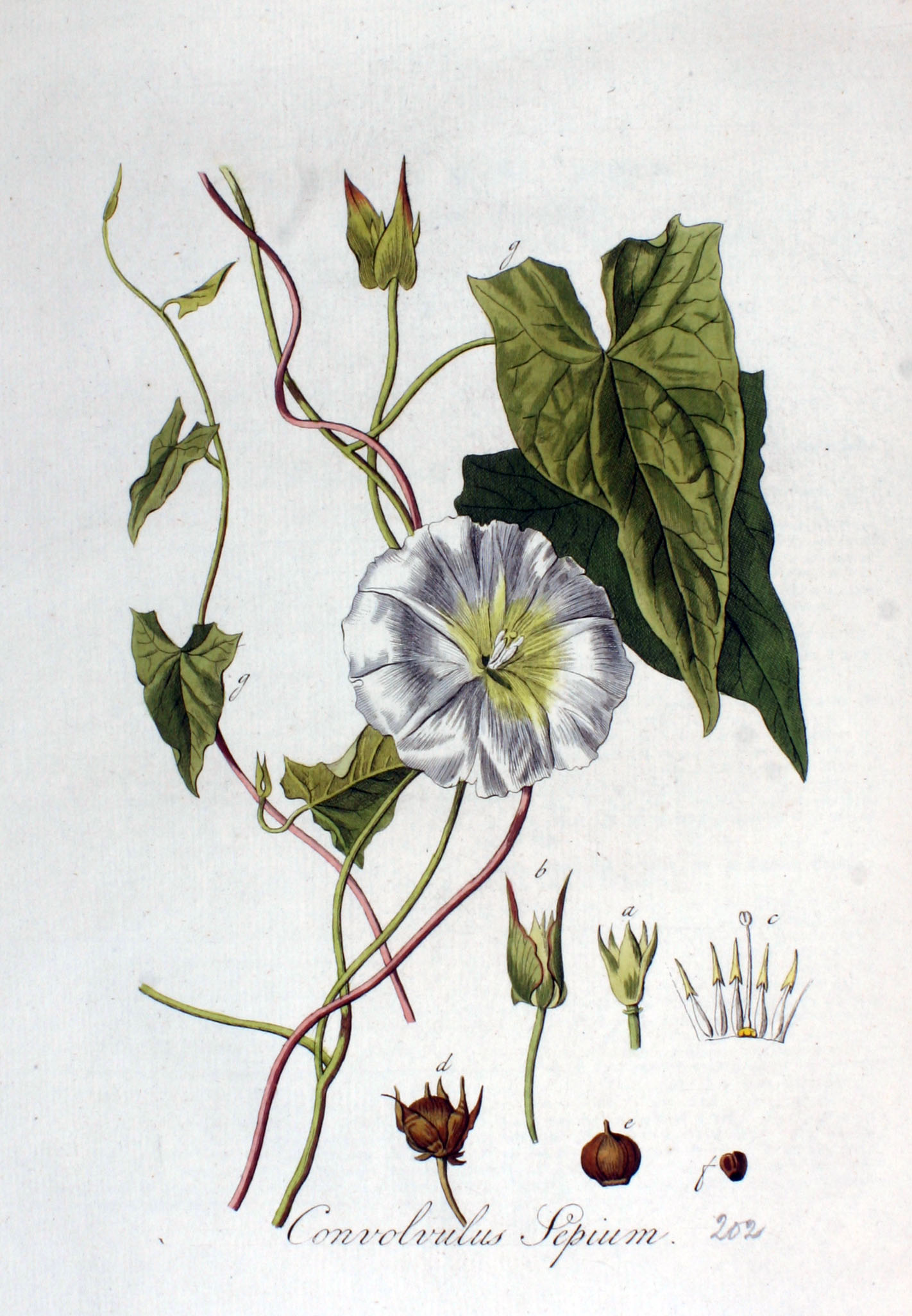 Calystegia sepium (L.) R. Brown (Syn. Convolvulus sepium L.)